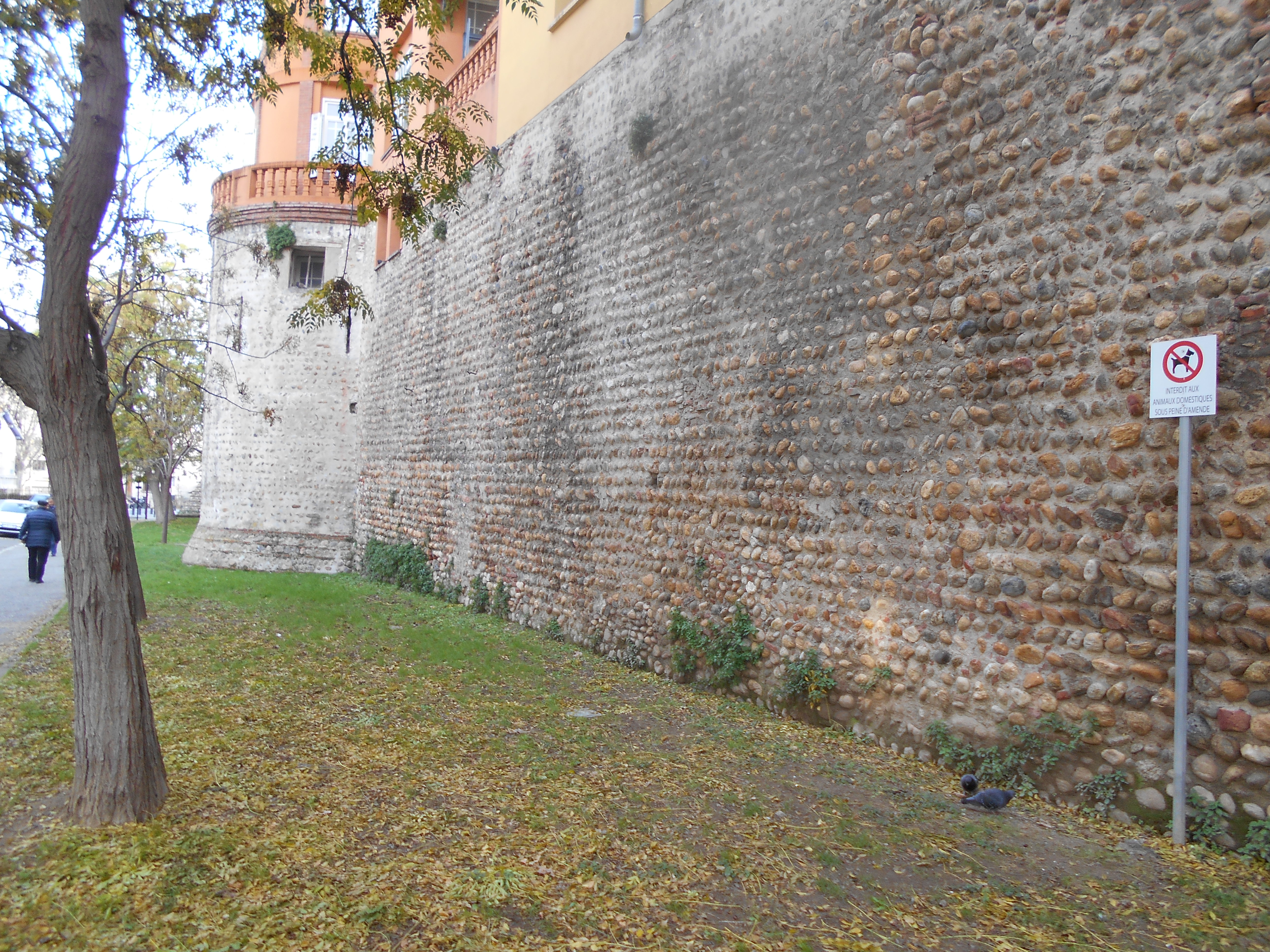 Muralla de Perpinyà de vers el 1300